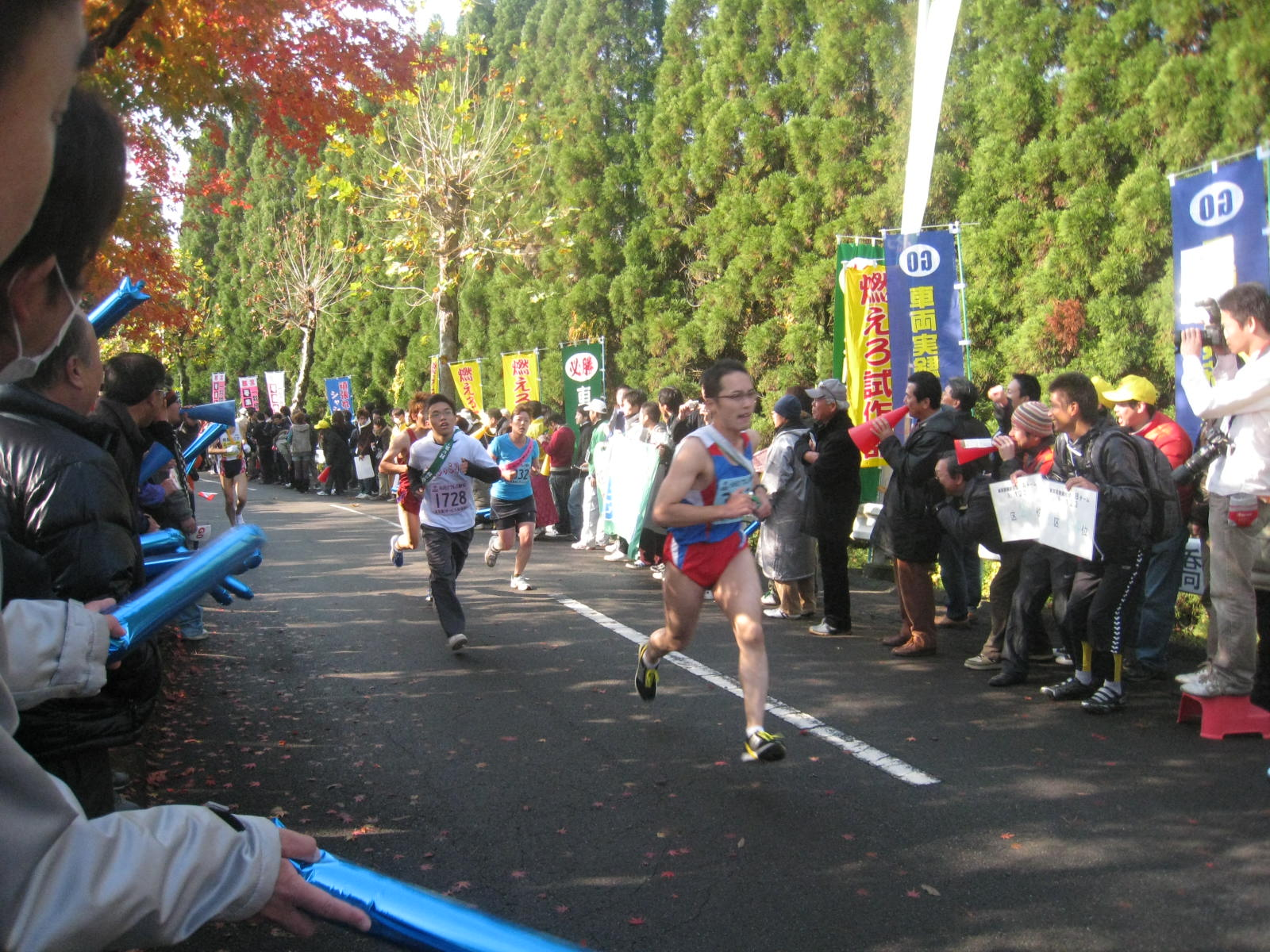 トヨタ自動車の社内駅伝大会。トヨタスポーツセンターにて。